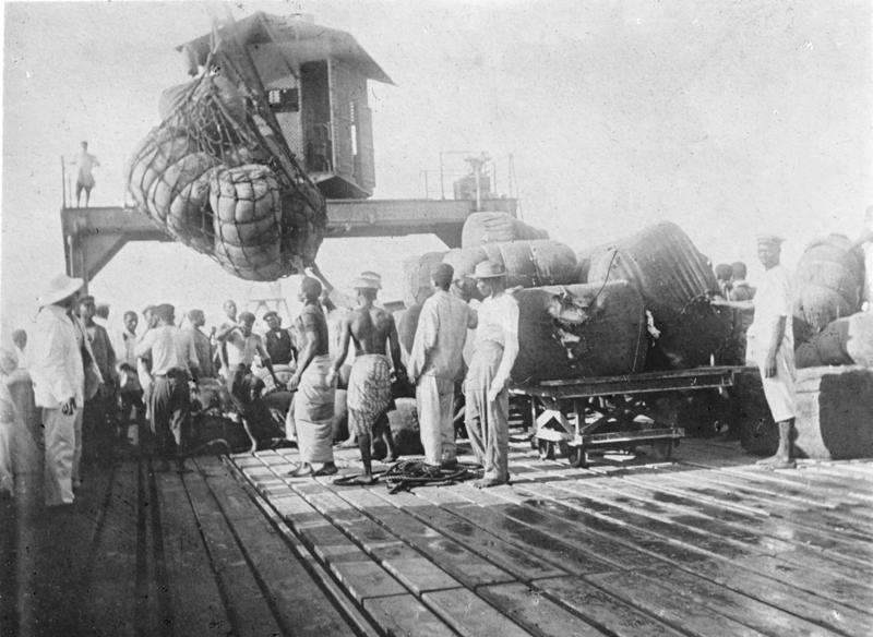 Togo, Lome, Verladen von Baumwollballen Verladen der Baumwolle auf der Brücke von Lome. Afrika-Togo